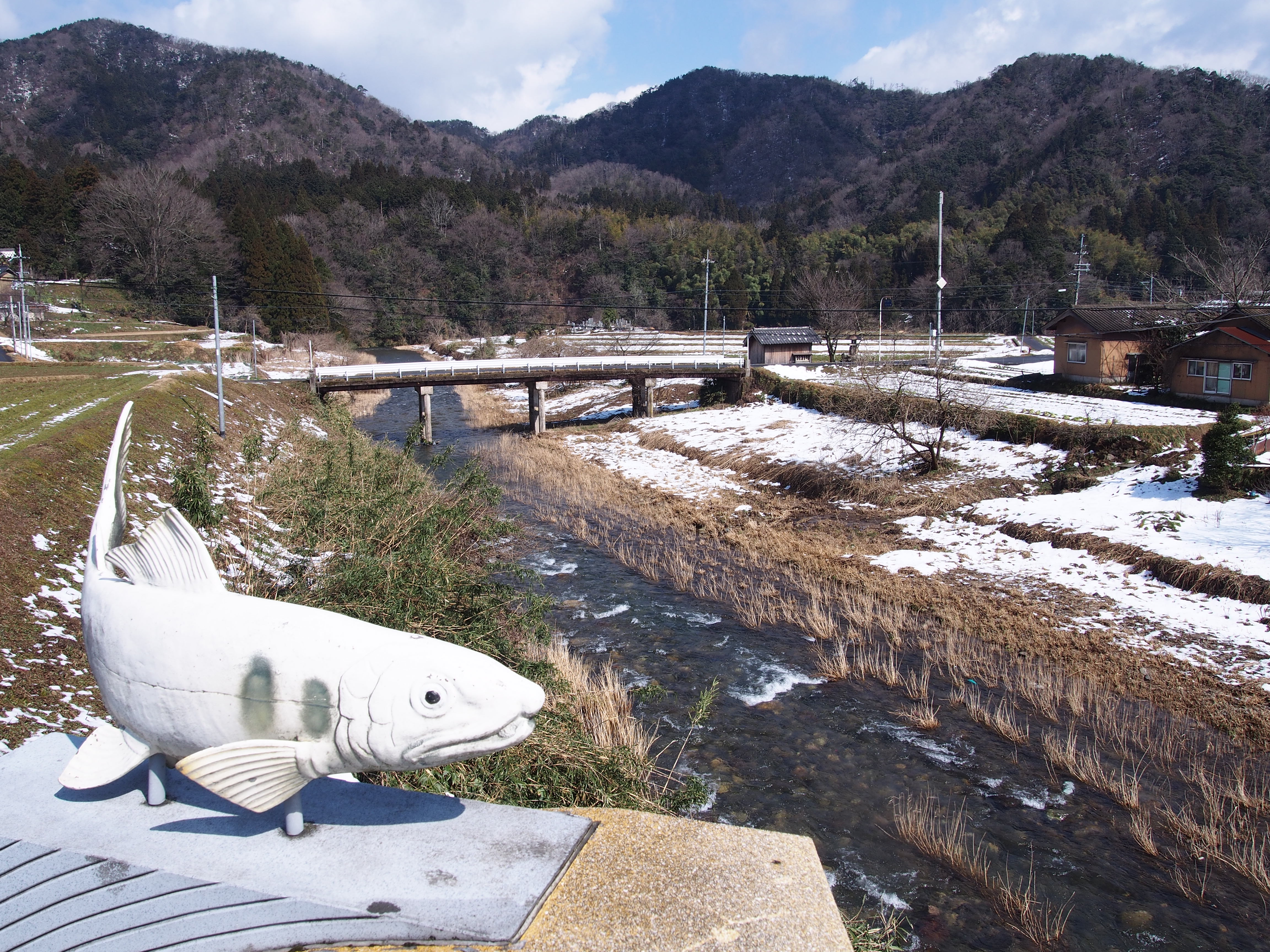 新中津橋から臨む宇川（京都府京丹後市弥栄町野中）。